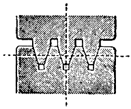 Kilhjul (tvärsnitt av omkretsarna)